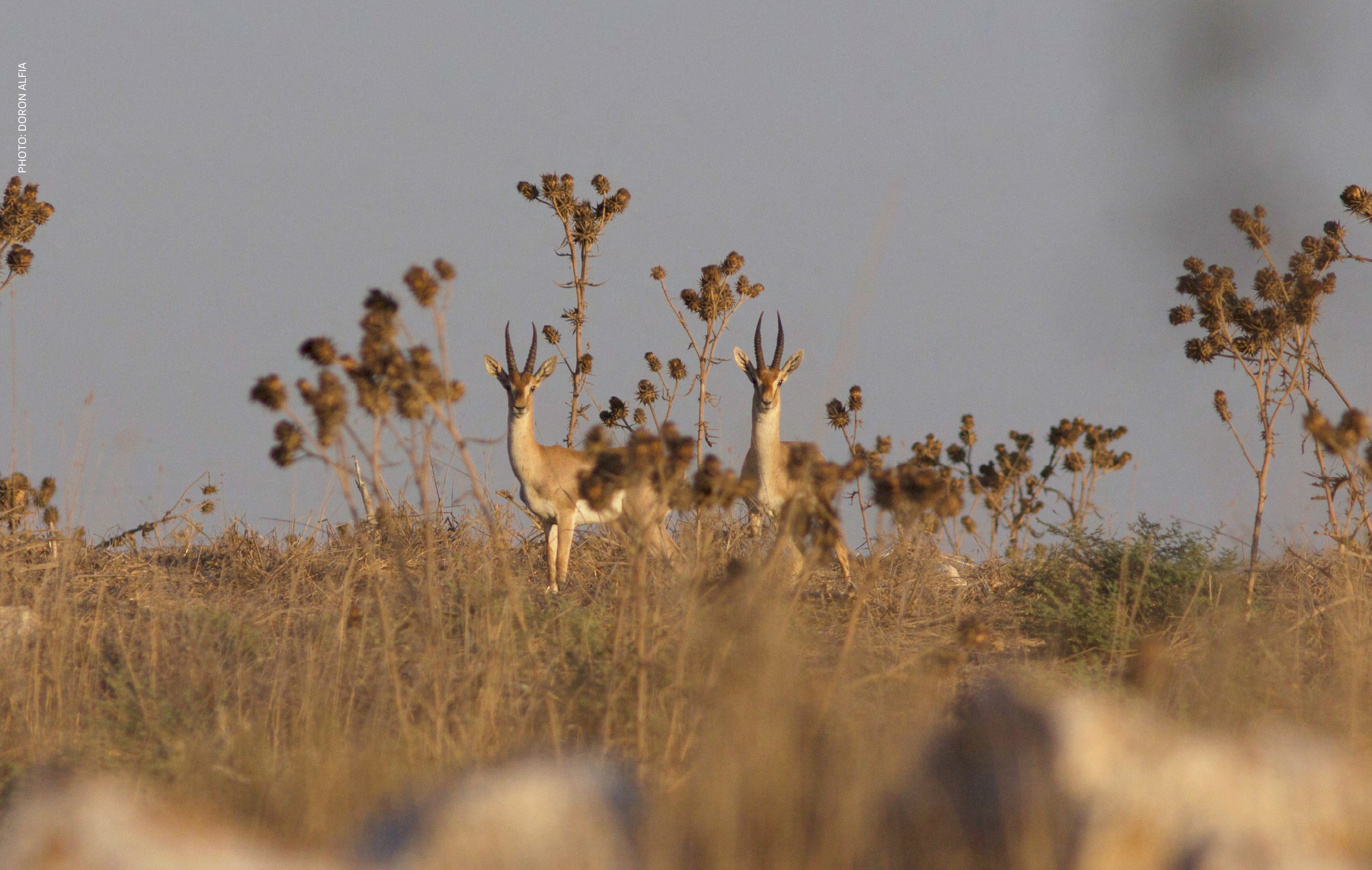 צבי ארץ ישראלי